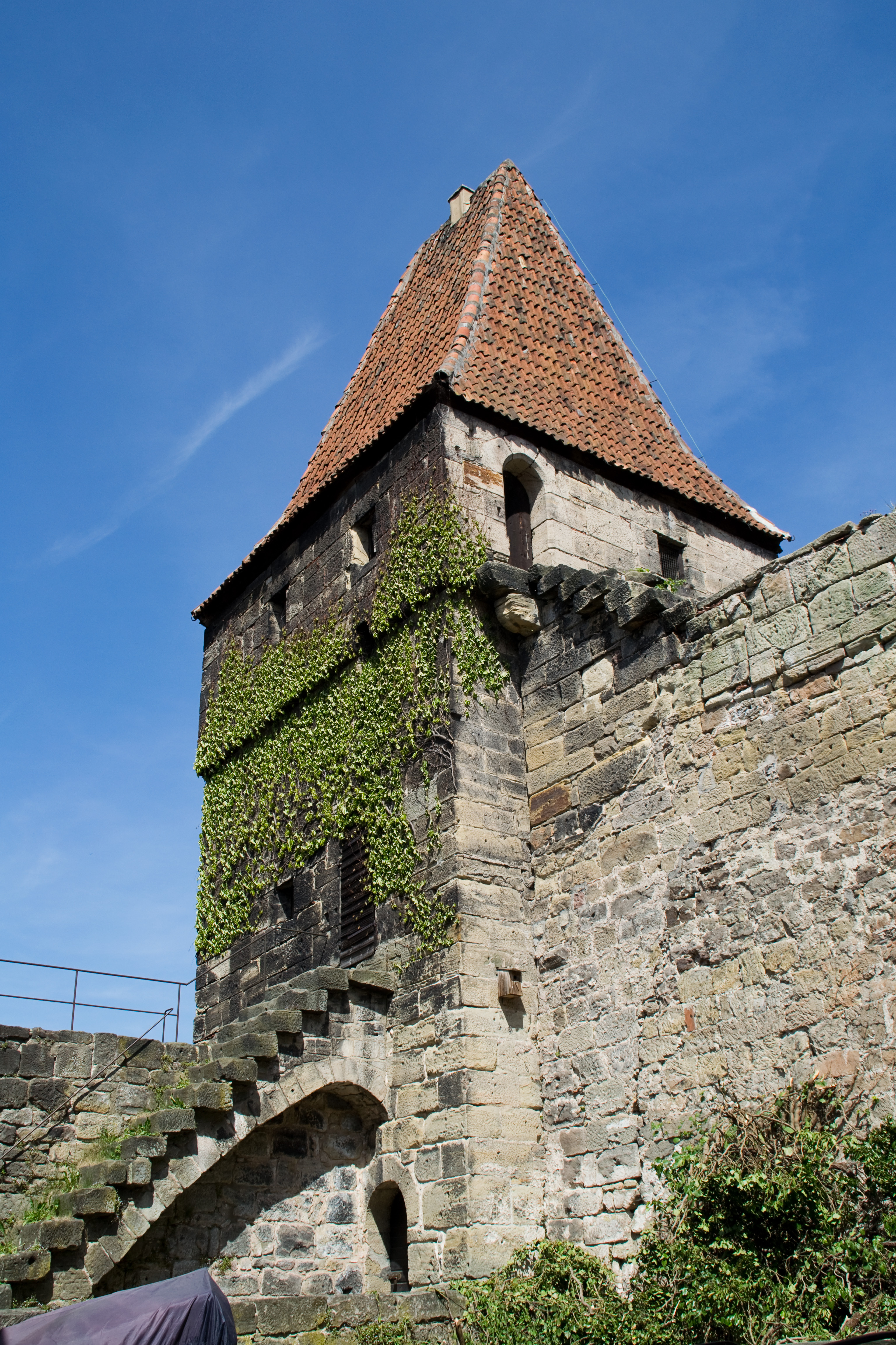 Hämel- oder Storchenturm in Kronach